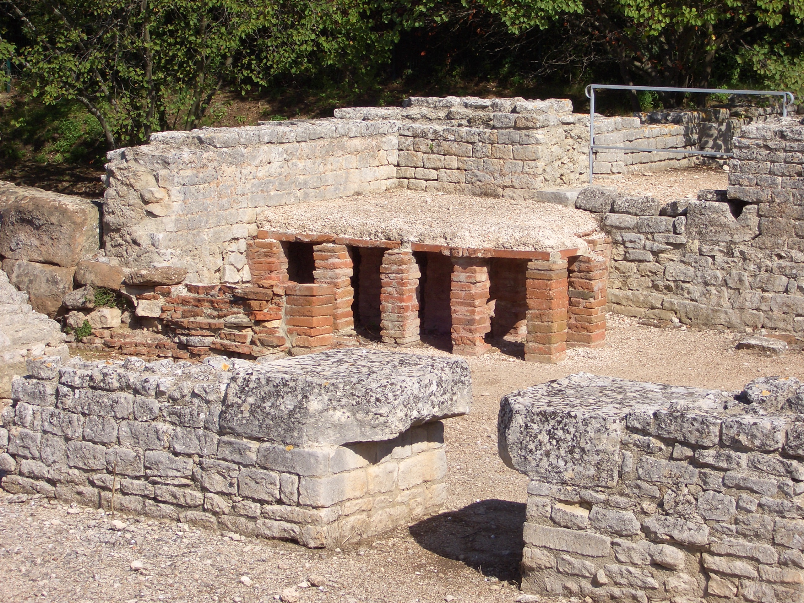 Glanum